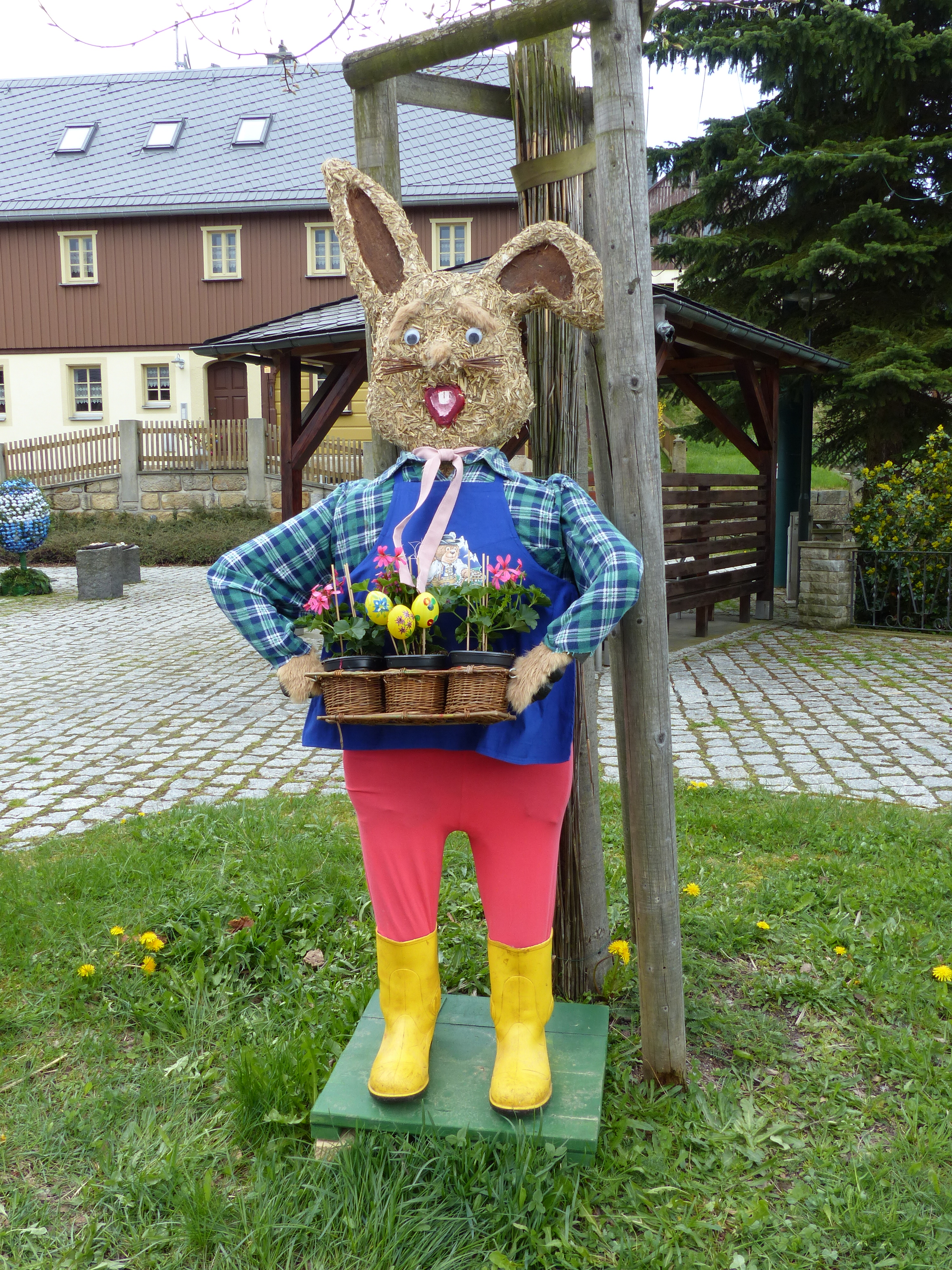 Osterhase in Hinterhermsdorf, Sachsen